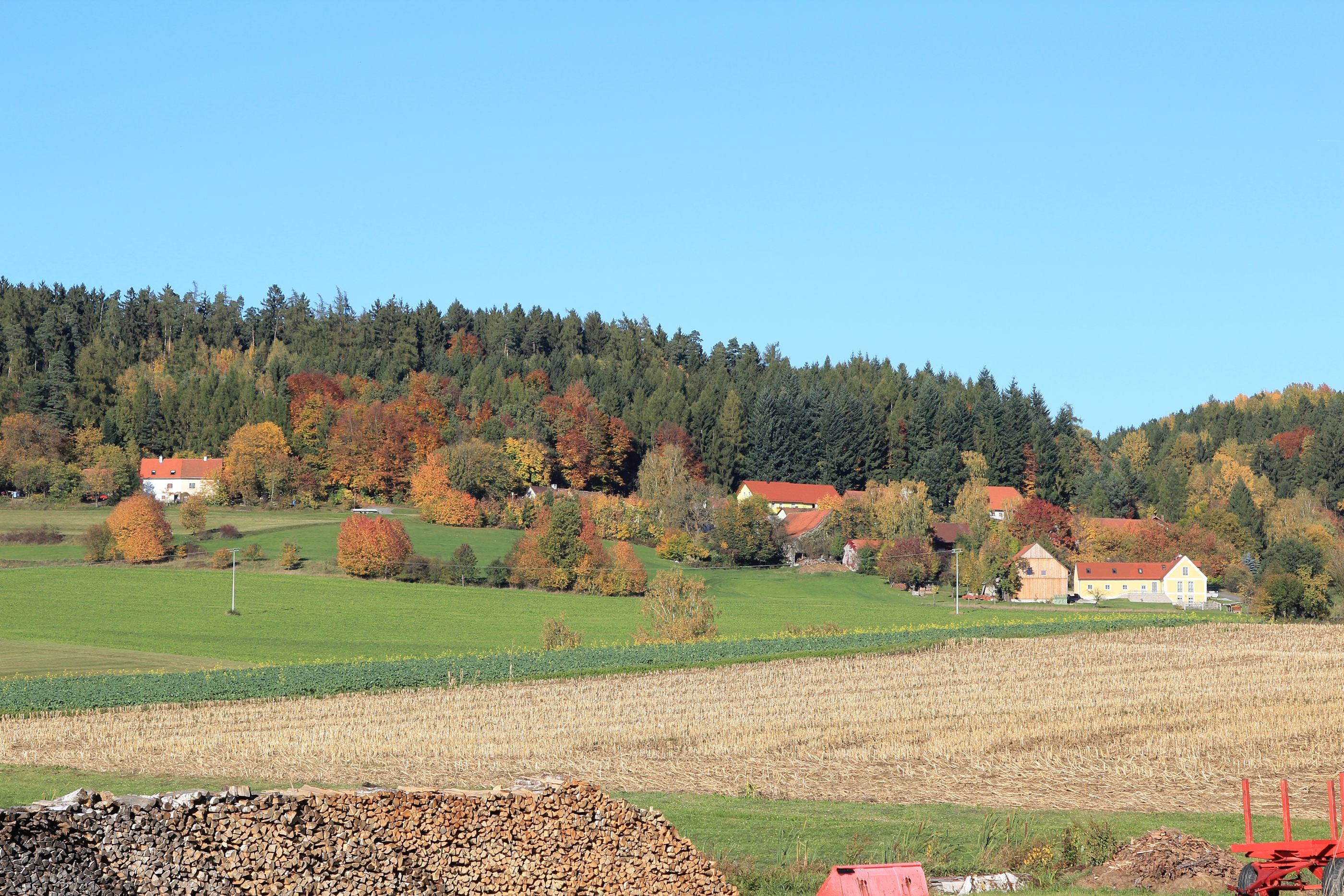 Forsthof bei Winklarn im Herbst 2017